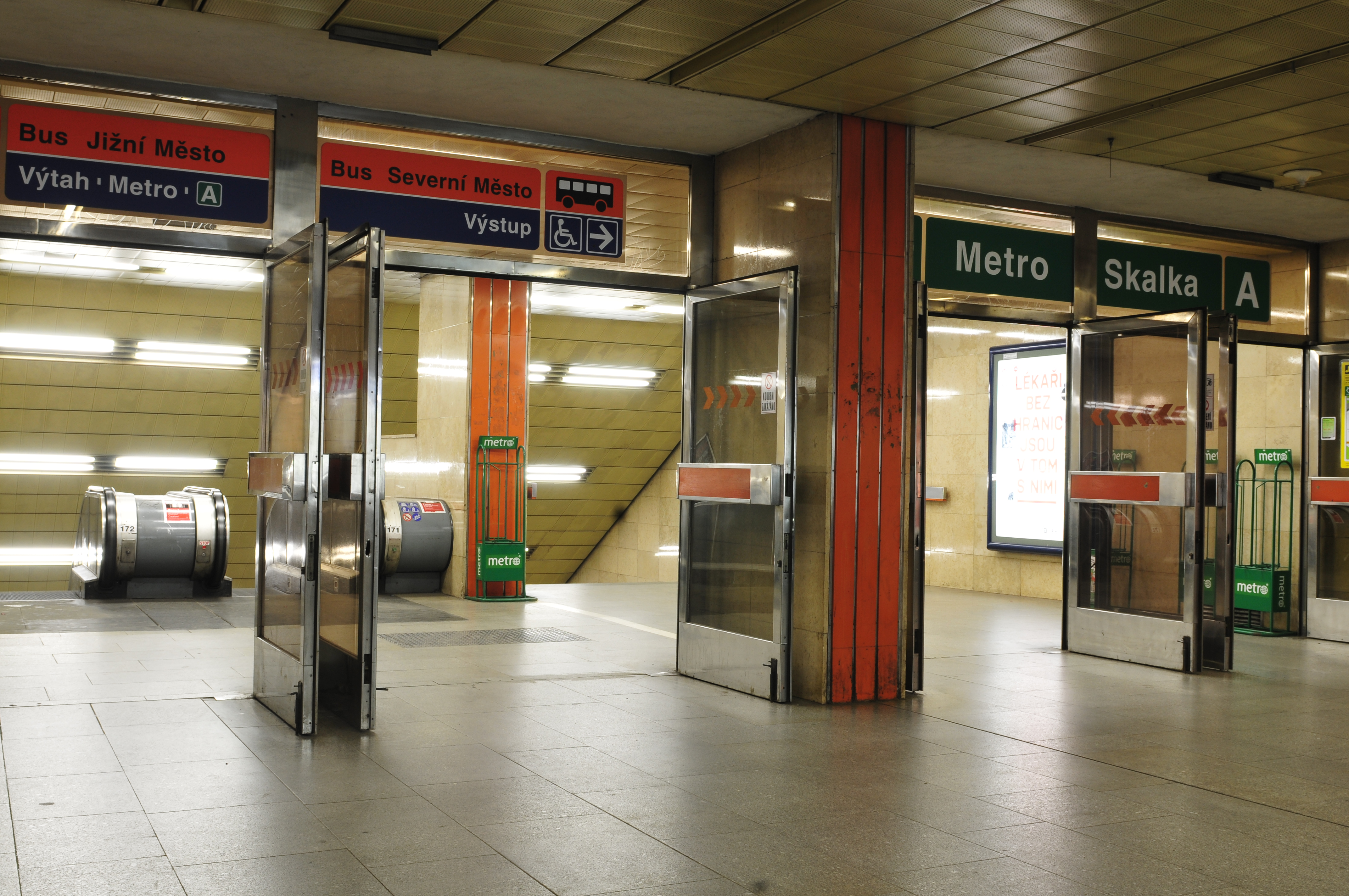 Metro Praha